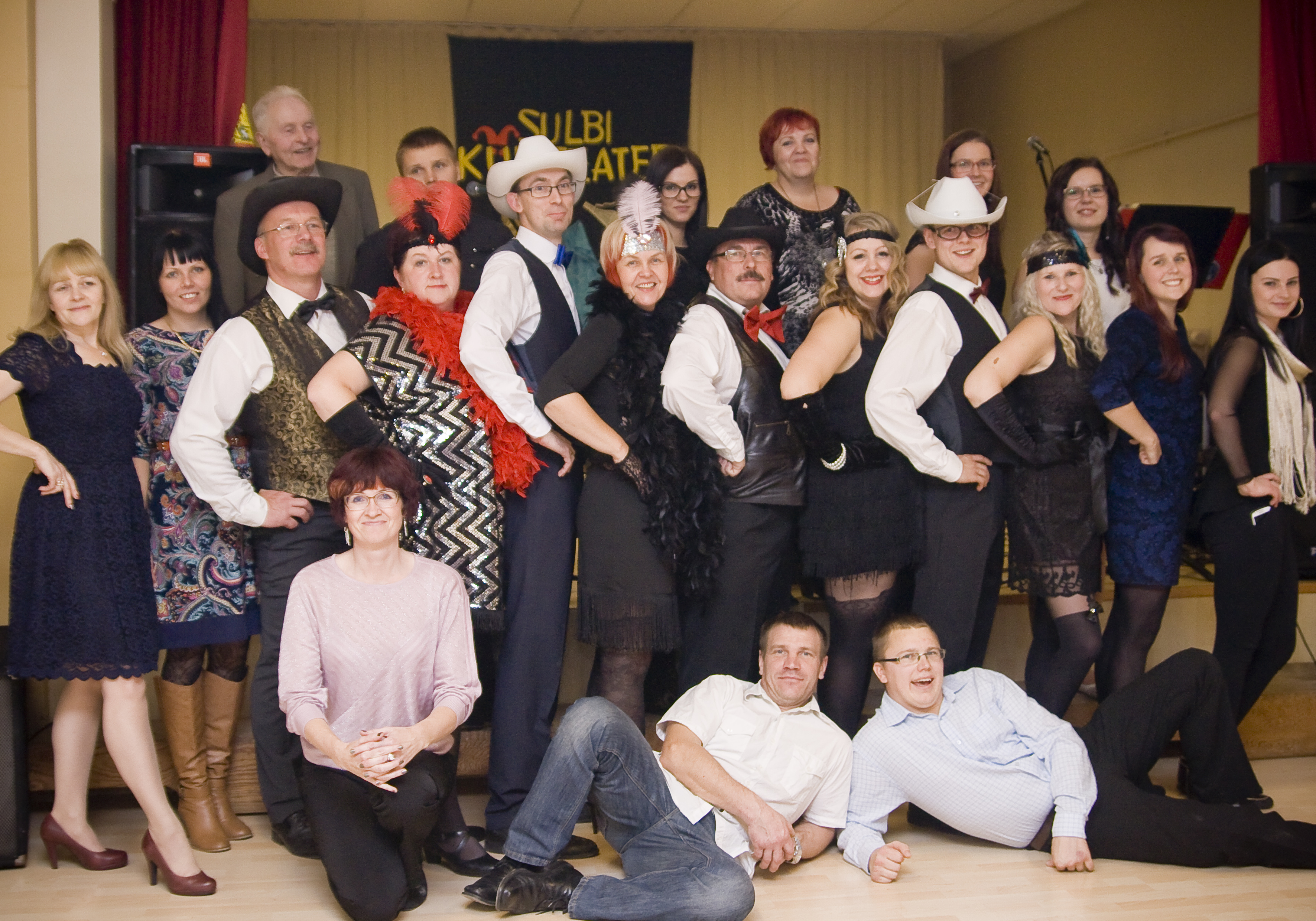 Fotol on Sulbi külateatri näitlejad, kes on mänginud teatris aastatel 2005-2015. Foto autor: Tiina Männe. Foto on tehtud Roosu talu vabaajakeskuses 21.11.2015